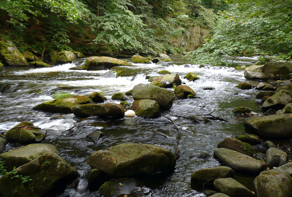 Bodetal mit wilder Bode